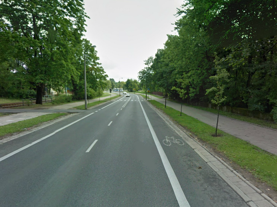 Pierwsza Droga rowerowa w Warszawie ul. Międzyparkowa